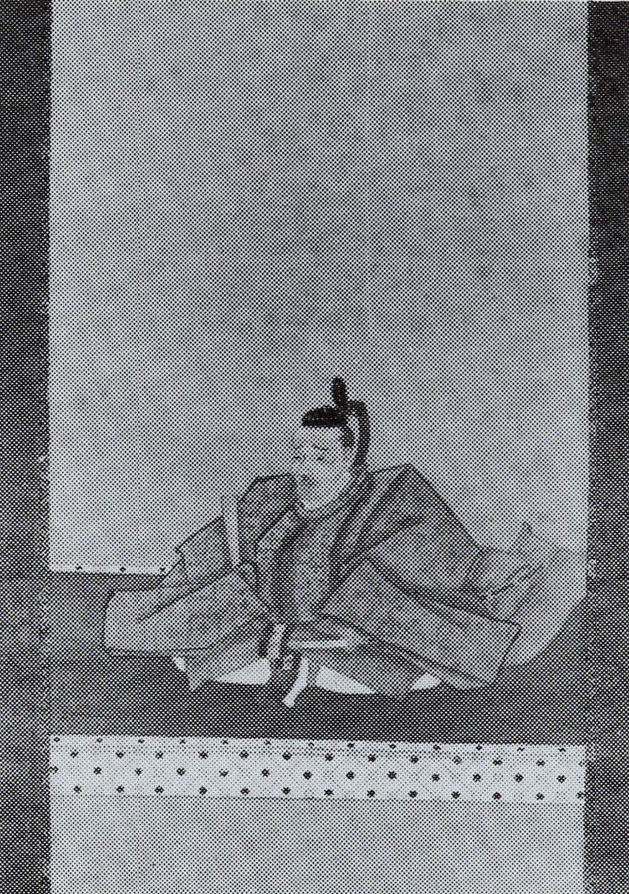 相良頼之の肖像(モノクロ)。